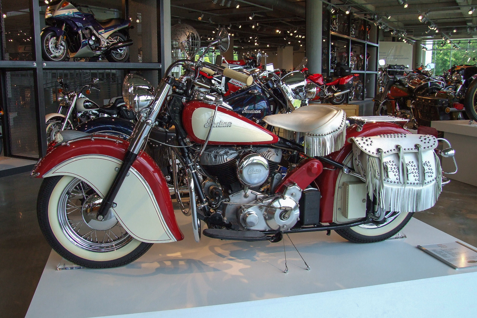 Indian Chief (1950) im Barber Vintage Motorsports Museum, Birmingham Alabama USA